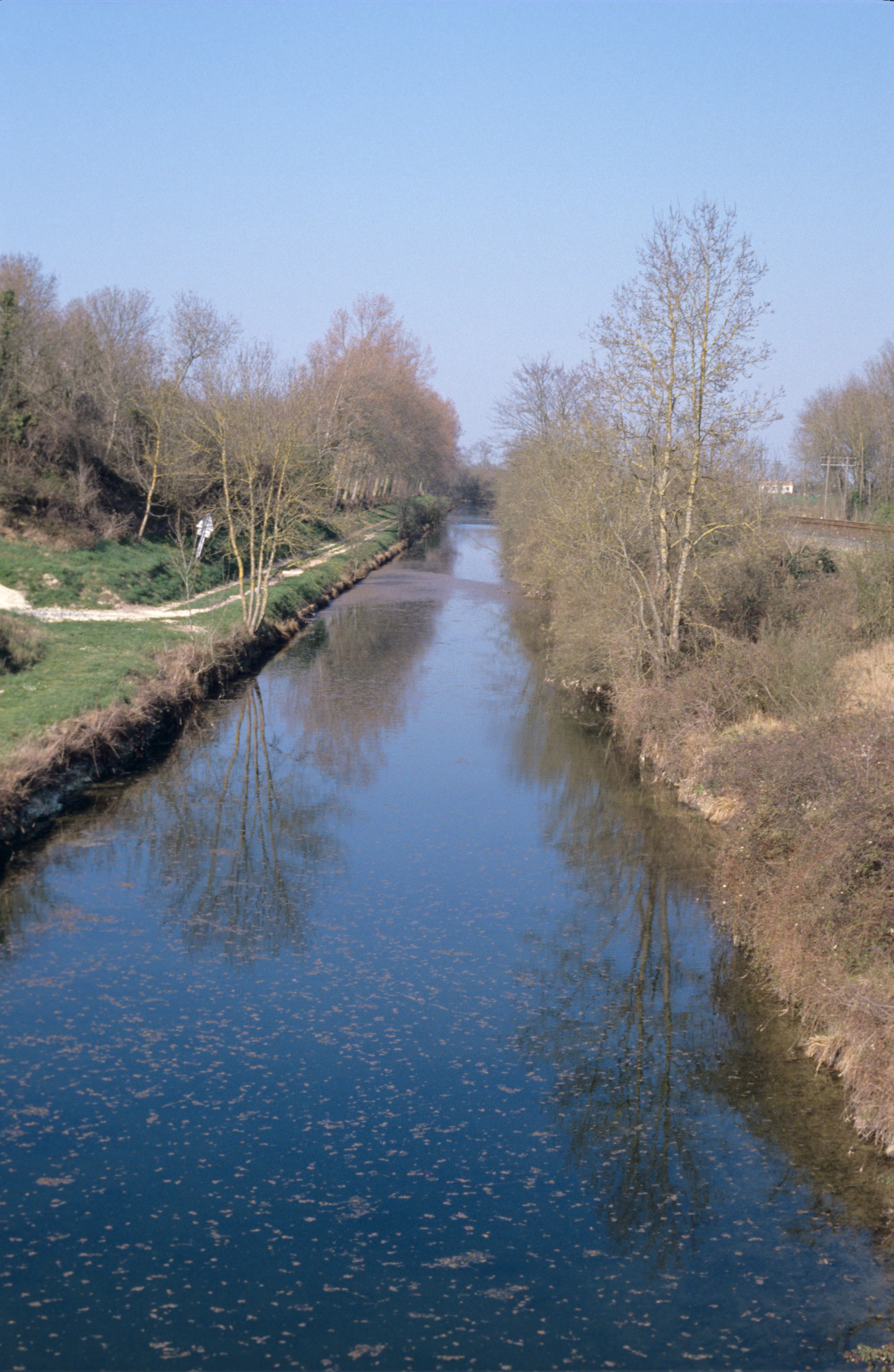 Le canal de Marans à La Rochelle photographié depuis le pont du hameau de Mouillepieds (dans le sens La Rochelle Marans). Marans est une ville située à une vingtaine de kilomètres au Nord-Est de La Rochelle. Mouillepieds, commune de Saint-Xandre (Communauté d' Agglomération de La Rochelle), Charente Maritime, France.